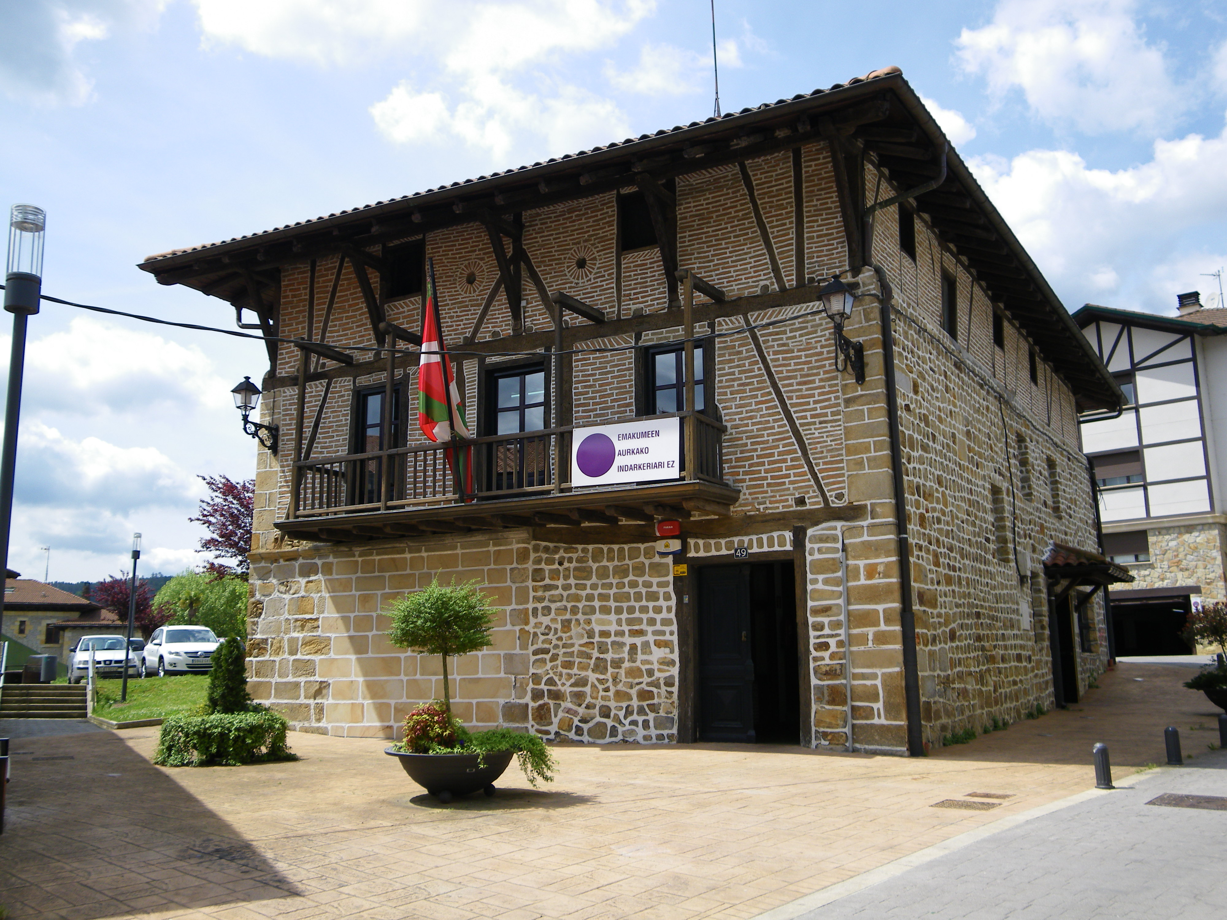 Arratiako Udalen Mankomunitatearen egoitza, Elexalde auzoa, Igorre, Bizkaia, Euskal Herria.